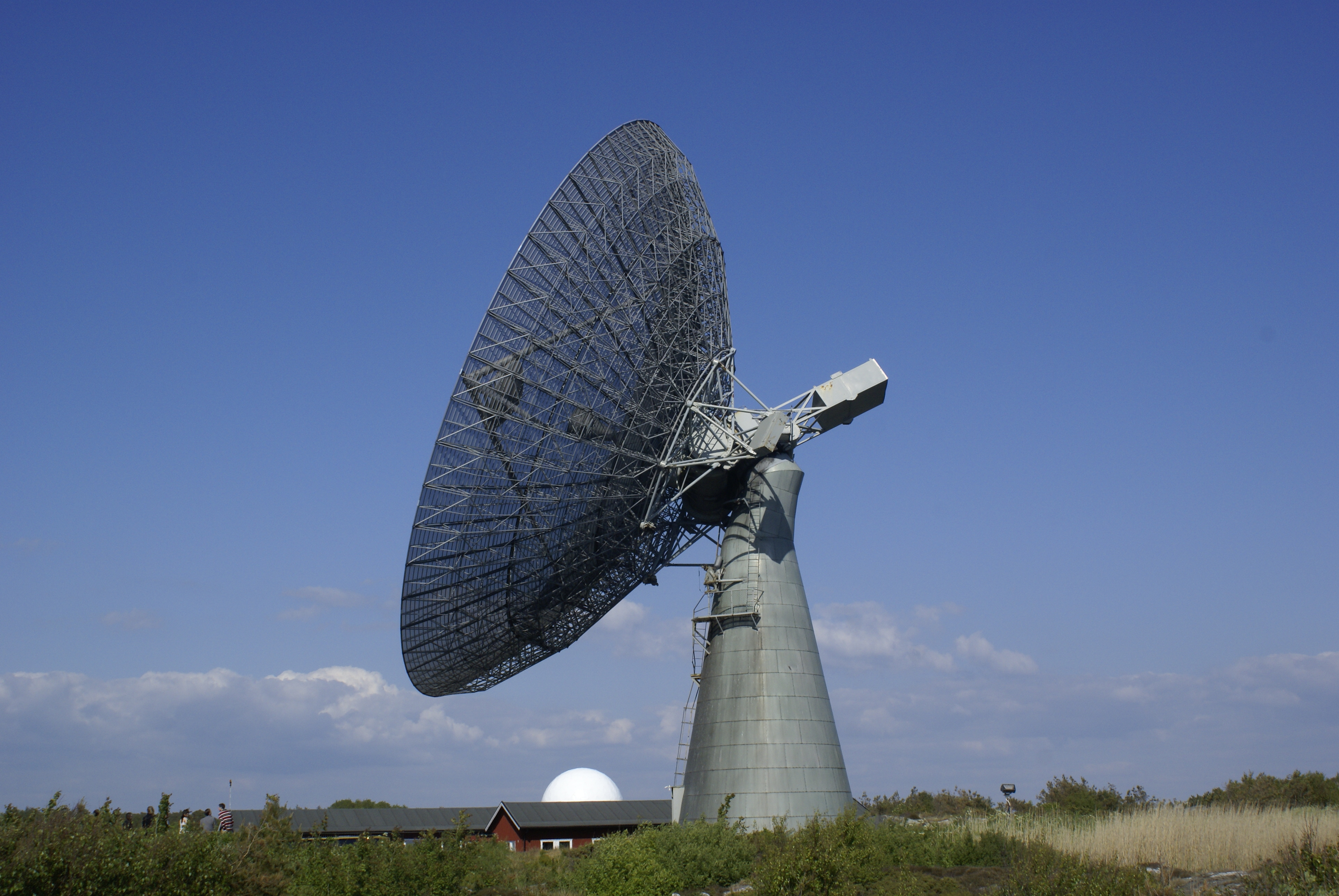 Radio telescope in Onsala rymdobservatorium